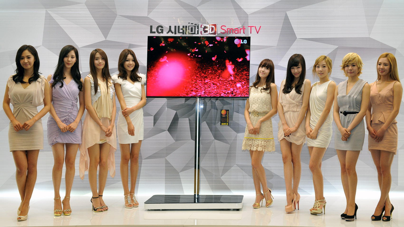 LG전자가 19일 서초구 양재동 소재 LG전자 서초R&D캠퍼스에서 ‘LG 시네마 3D 스마트TV 신제품 발표회’를 가졌다. (왼쪽부터) LG전자 HE사업본부 TV사업부장 노석호 전무, 한국마케팅본부장 최상규 부사장, HE사업본부장 권희원 사장 ※ LG전자 뉴스룸 에서 관련 보도자료를 확인실 수 있습니다.